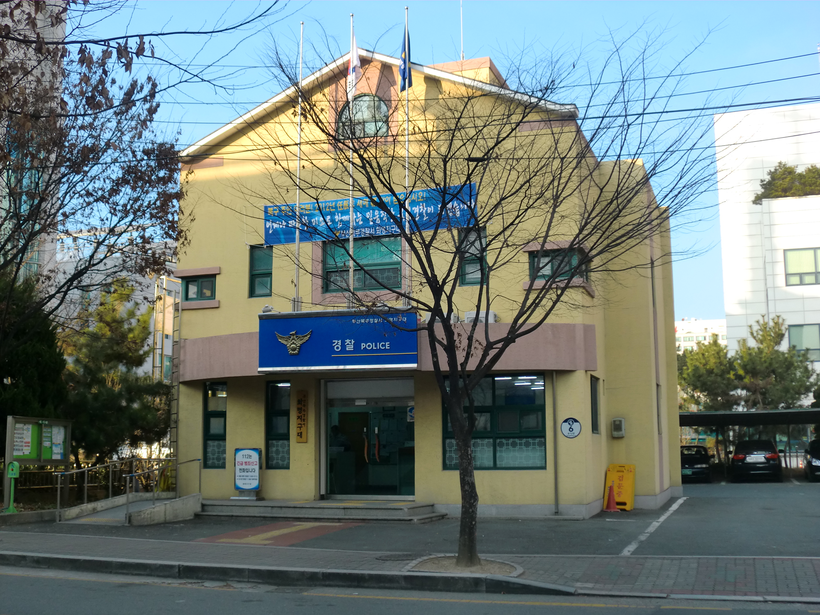 부산광역시 북구에 있는 부산북부경찰서 화명지구대